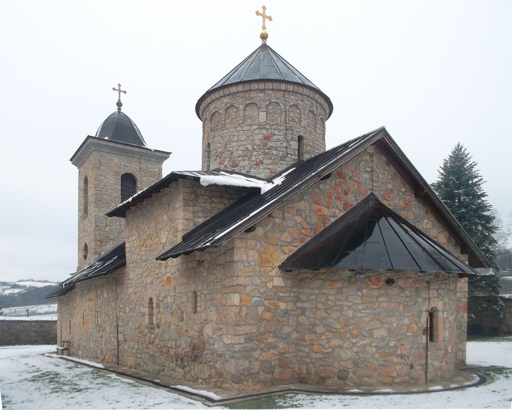 Манастир Гомионица-Храм Ваведења Пресвете Богородице